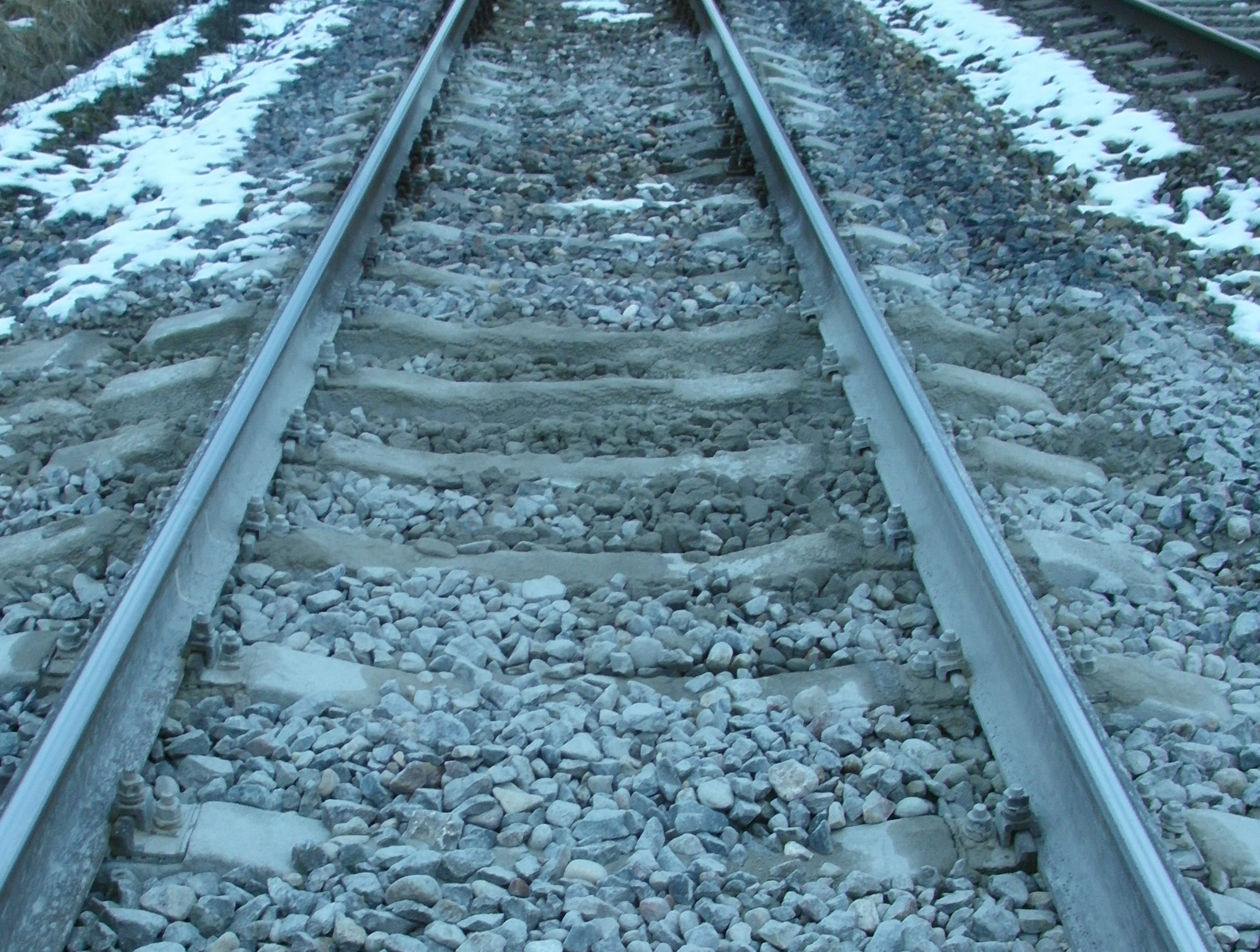 Izšļākumi